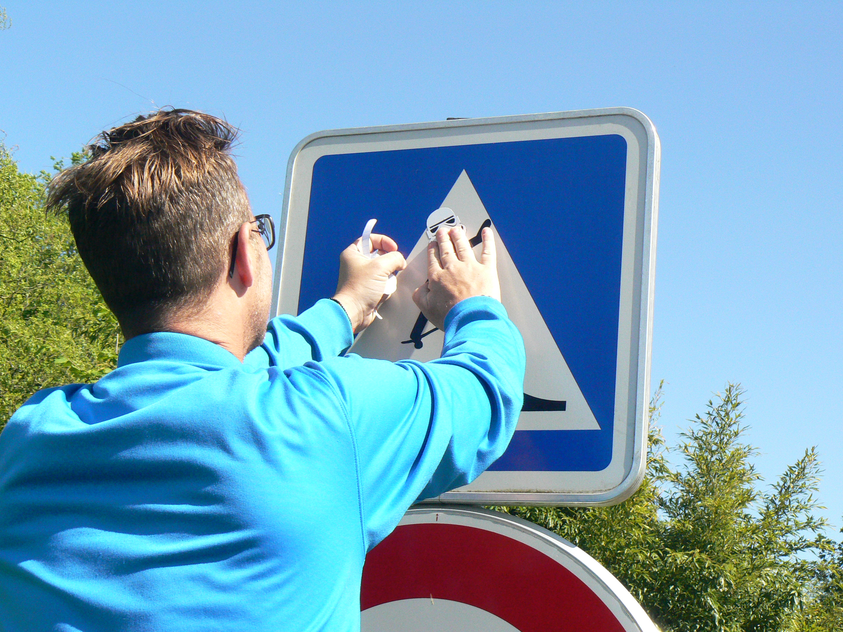 Jinks Kunst en action en avril 2018